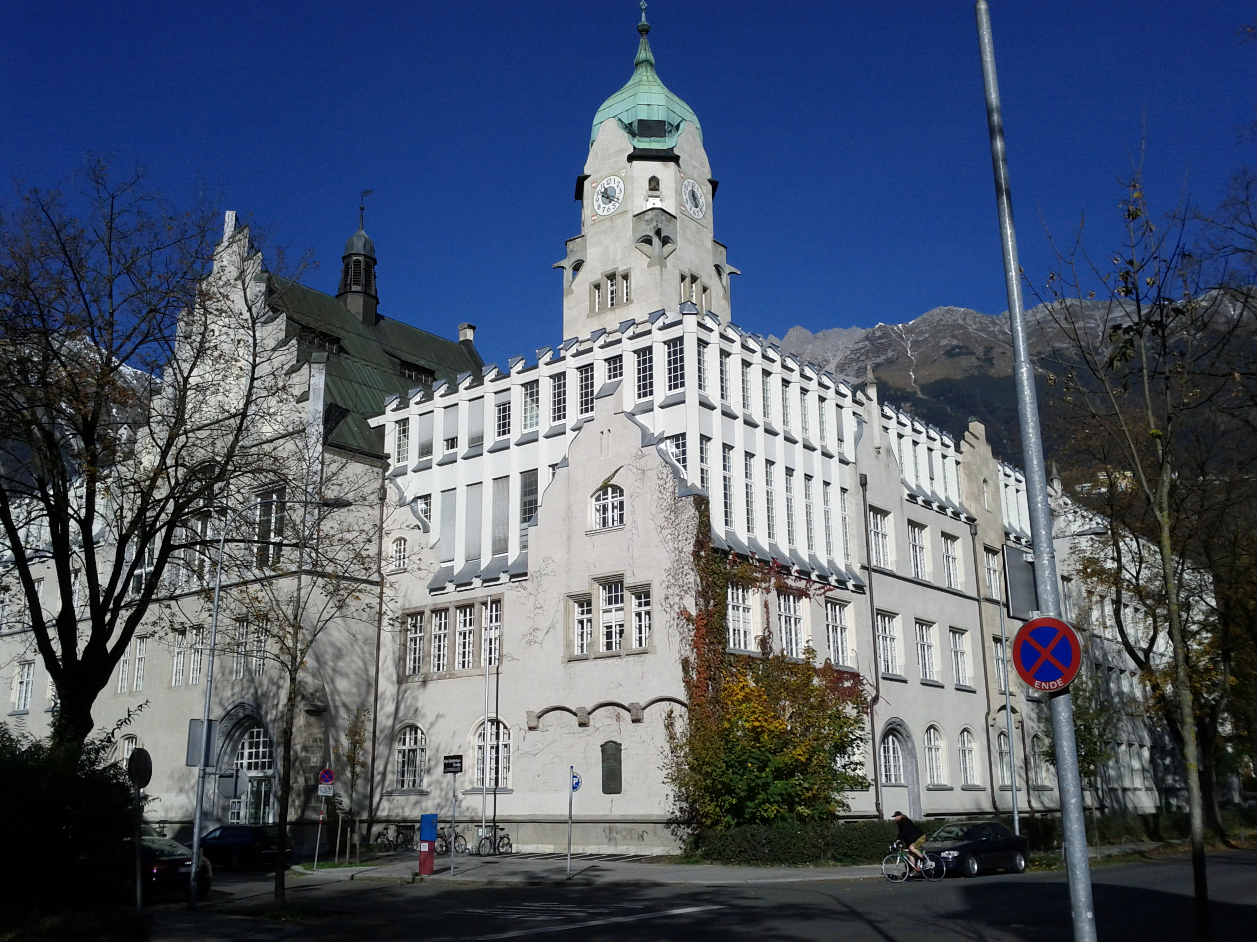 Bundeshandelsakademie und Bundeshandelsschule: Karl-Schönherr-Straße 2 in Innsbruck